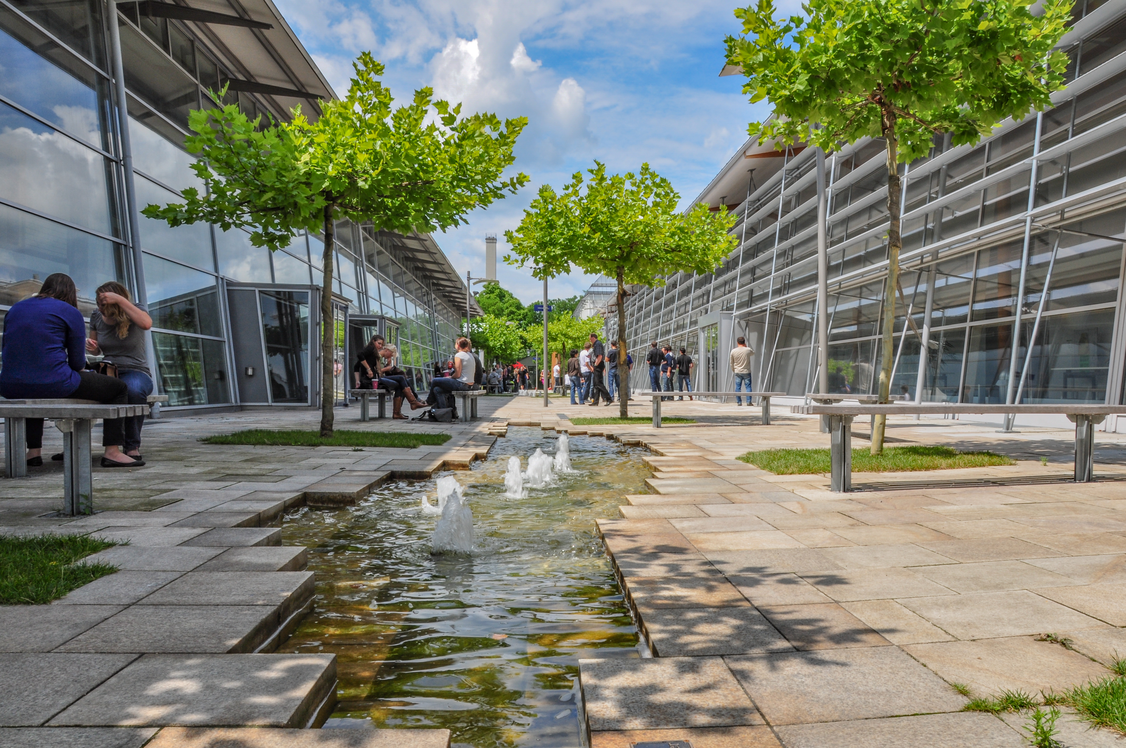 Foto vom Durchgang zwischen dem R- und S-Bau an der Technischen Hochschule Rosenheim von Oliver Pausch